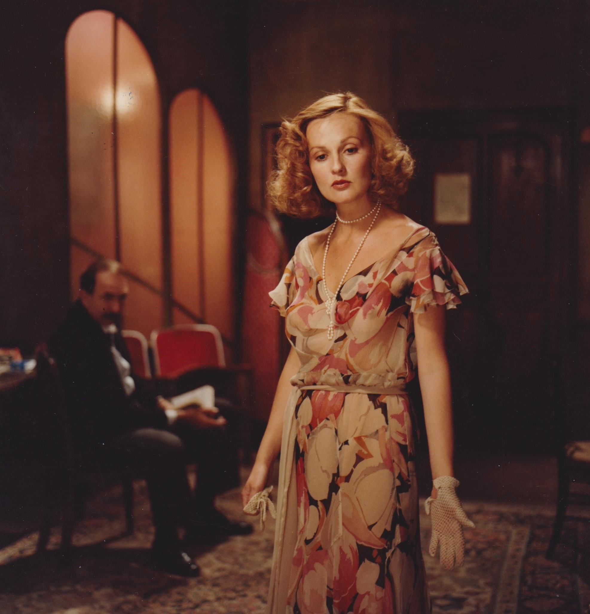 La scène se déroule dans une loge de théâtre et le personnage interprété par Jean-Pierre Marielle fait répéter une scène à une comédienne débutante.